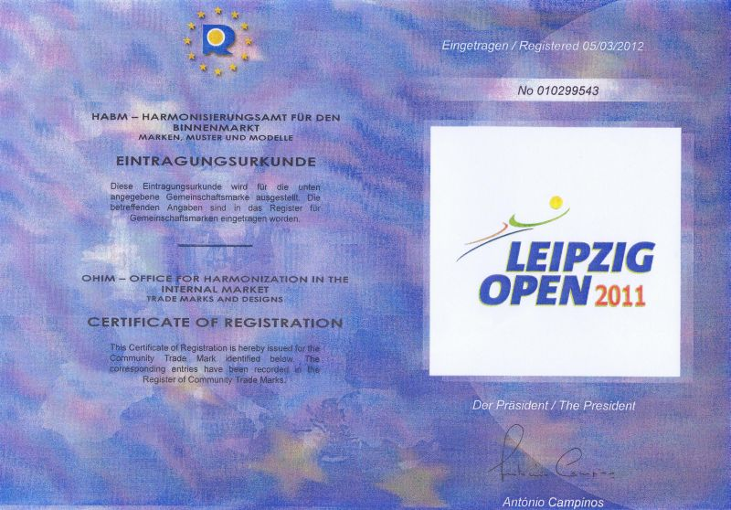 Das Logo der LEIPZIG OPEN ist beim europäischen Harmonisierungsamt für den Binnenmarkt als Gemeinschaftsmarke auf den Leipziger Tennisclub 1990 e.V. registriert.